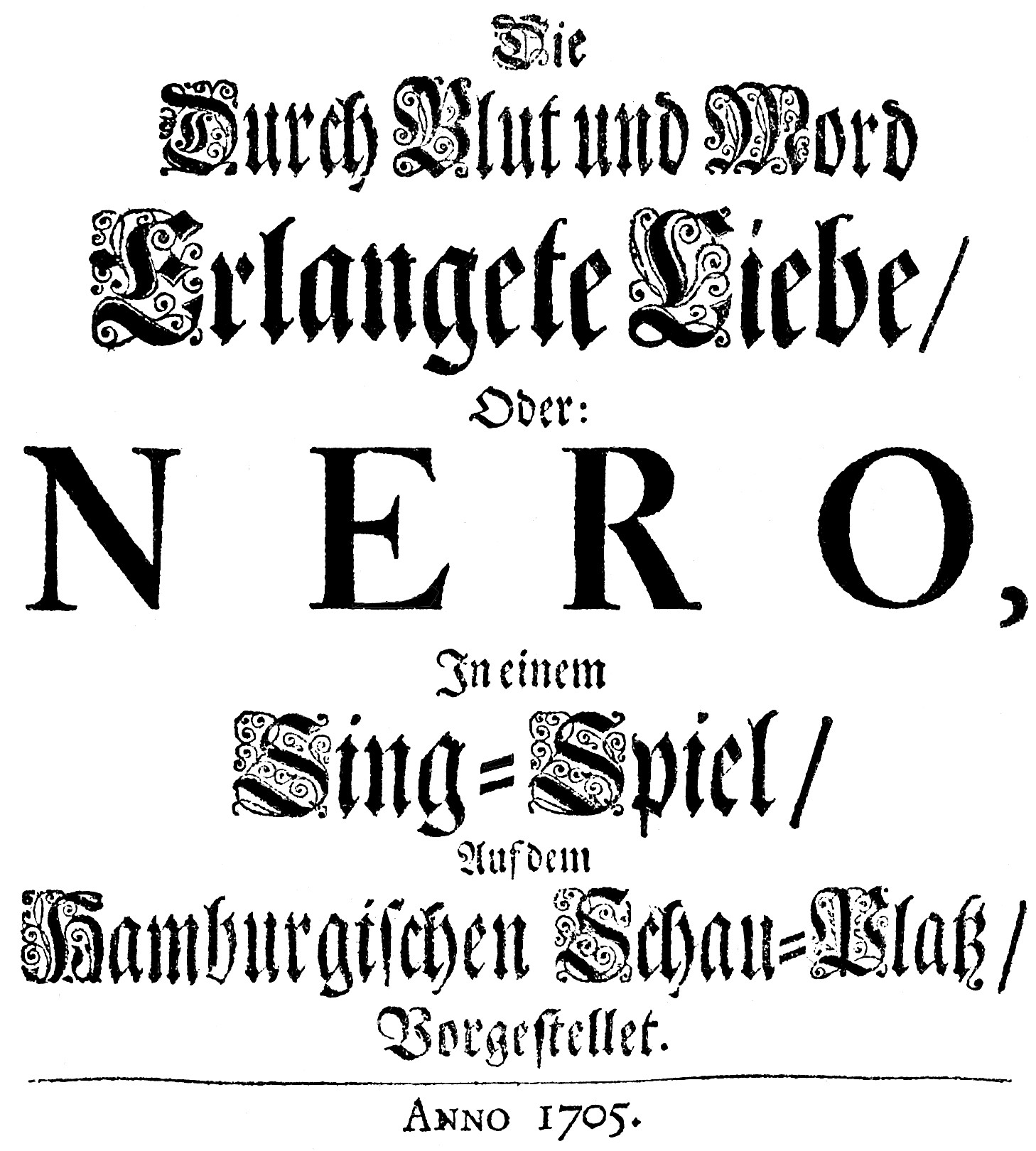 Titelblatt des Textheftes von Händels Oper. Gänsemarkt-Theater 1705.